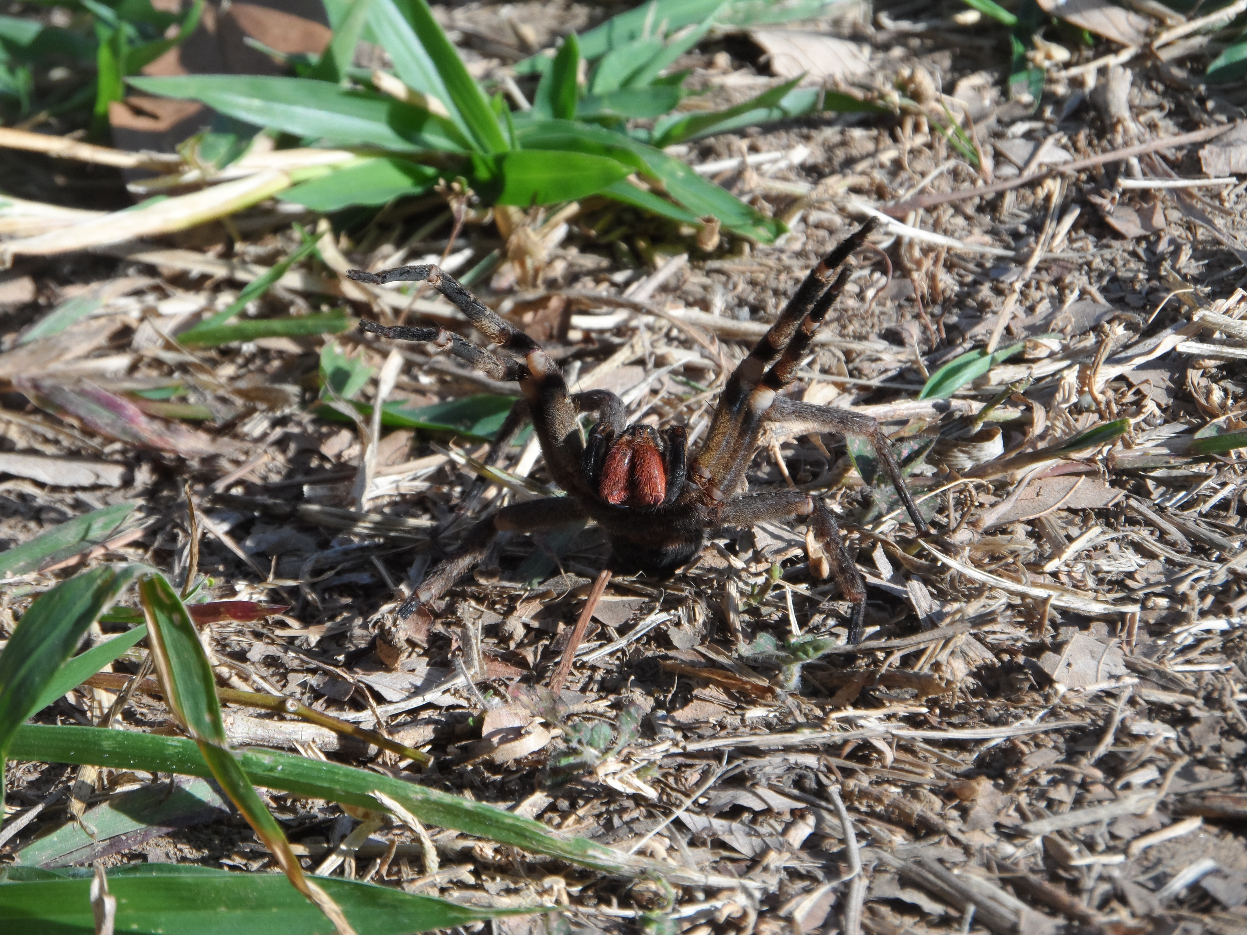 Aranha armadeira (Phoneutria) na RPPN São Lourenço do Funil, Serra Negra, município de Rio Preto, Zona da Mata, Minas Gerais, Brasil.